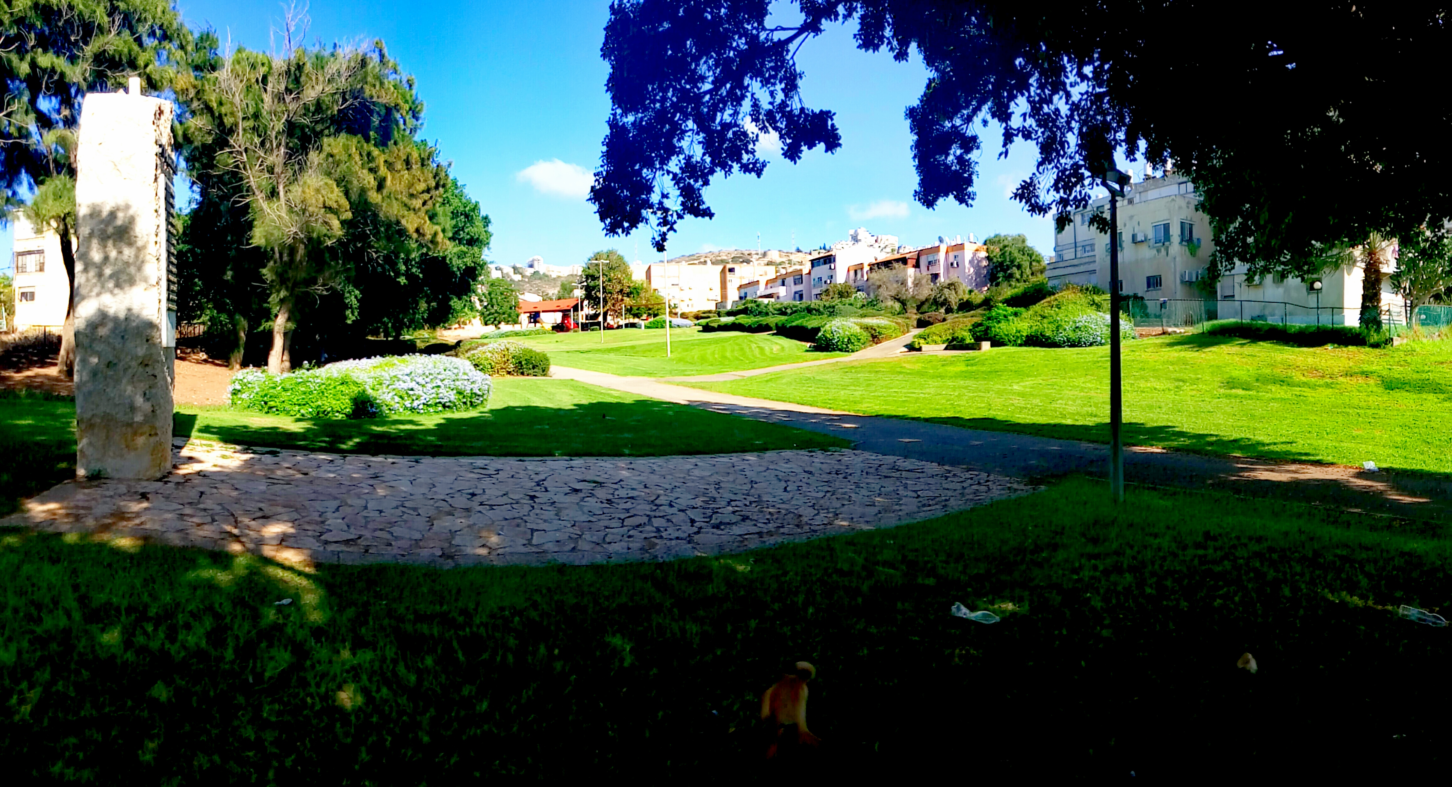 גן הבנים בשכונת נווה דוד בחיפה, בתמונה: האנדרטה לזכר הנופלים וגן המשחקים שנבנה במעלה הפארק